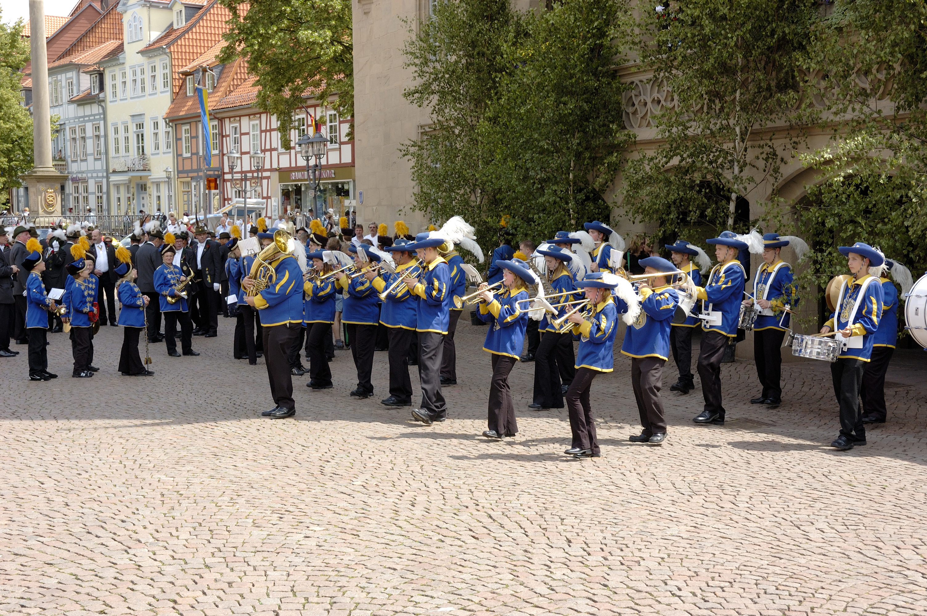 Duderstädter Spielmannszug vor dem Rathaus. Foto von Oliver Thiele während des Schützenumzuges 2006